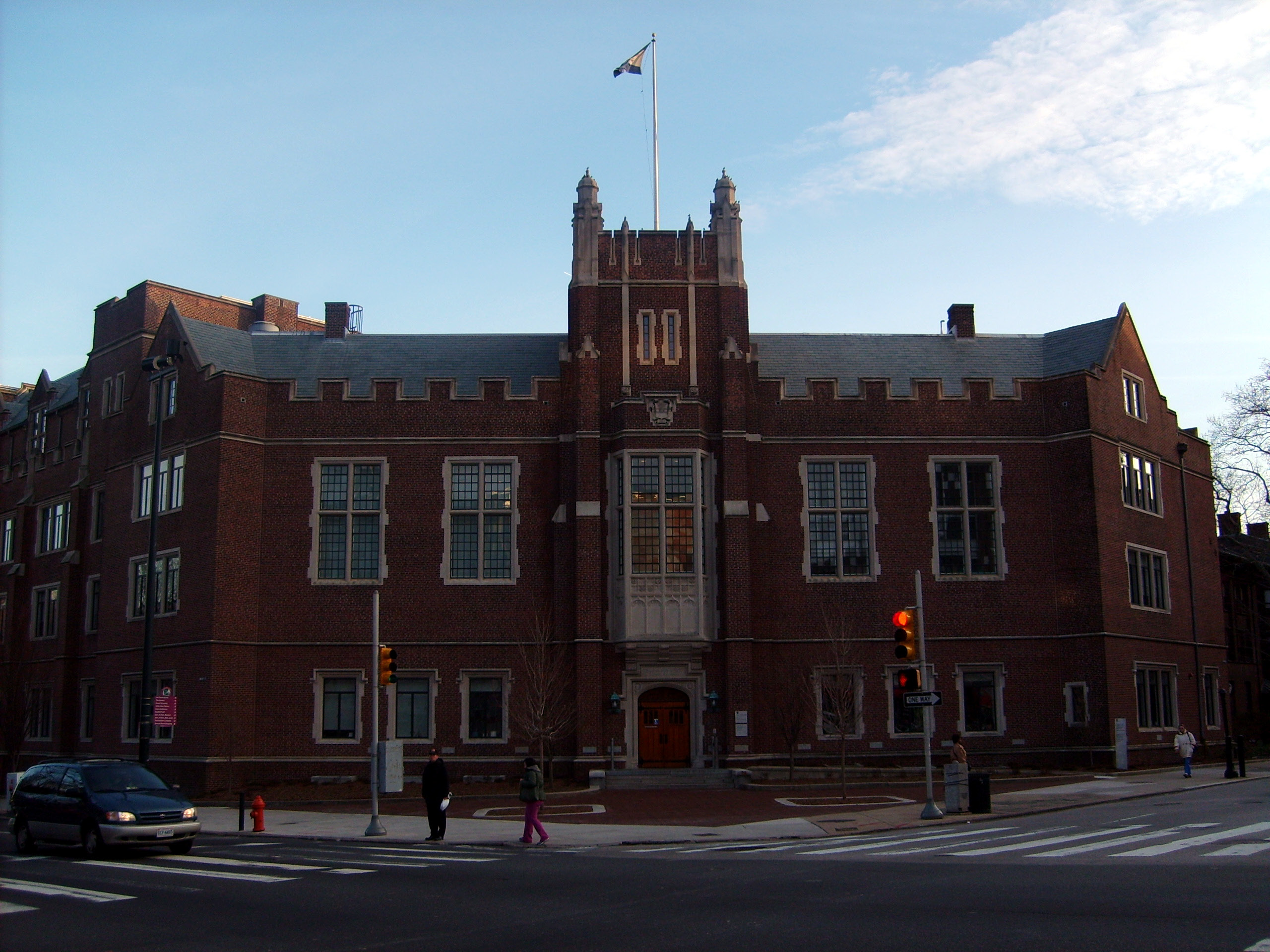 Fisher-Bennett Hall